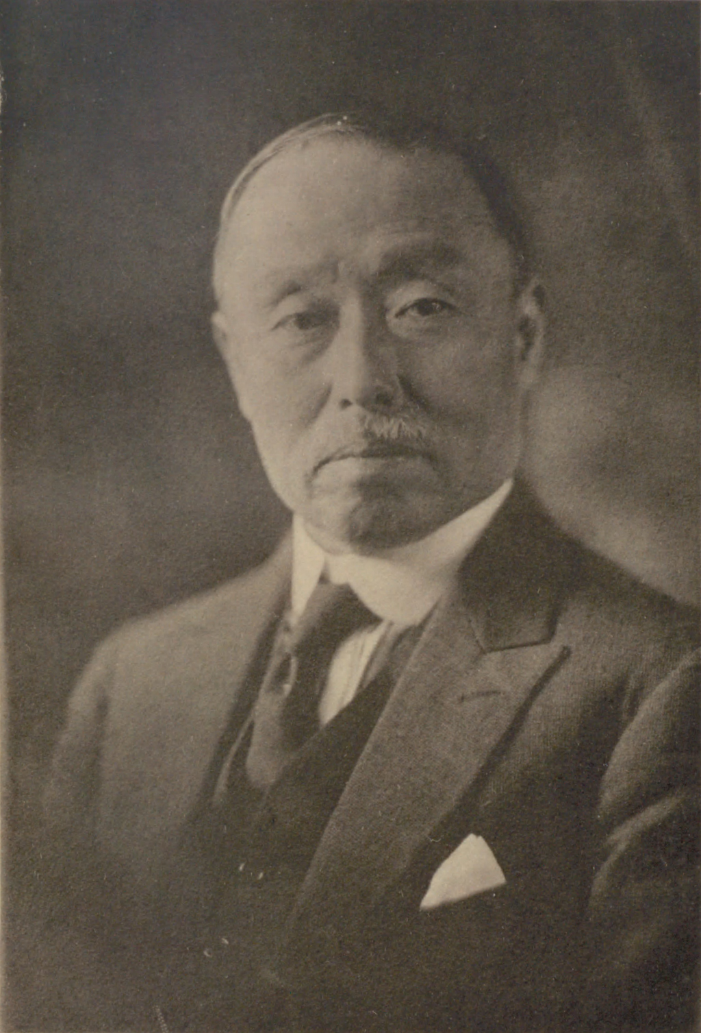 Portrait of Sawayanagi Masataro (澤柳政太郎, 1865 – 1927)